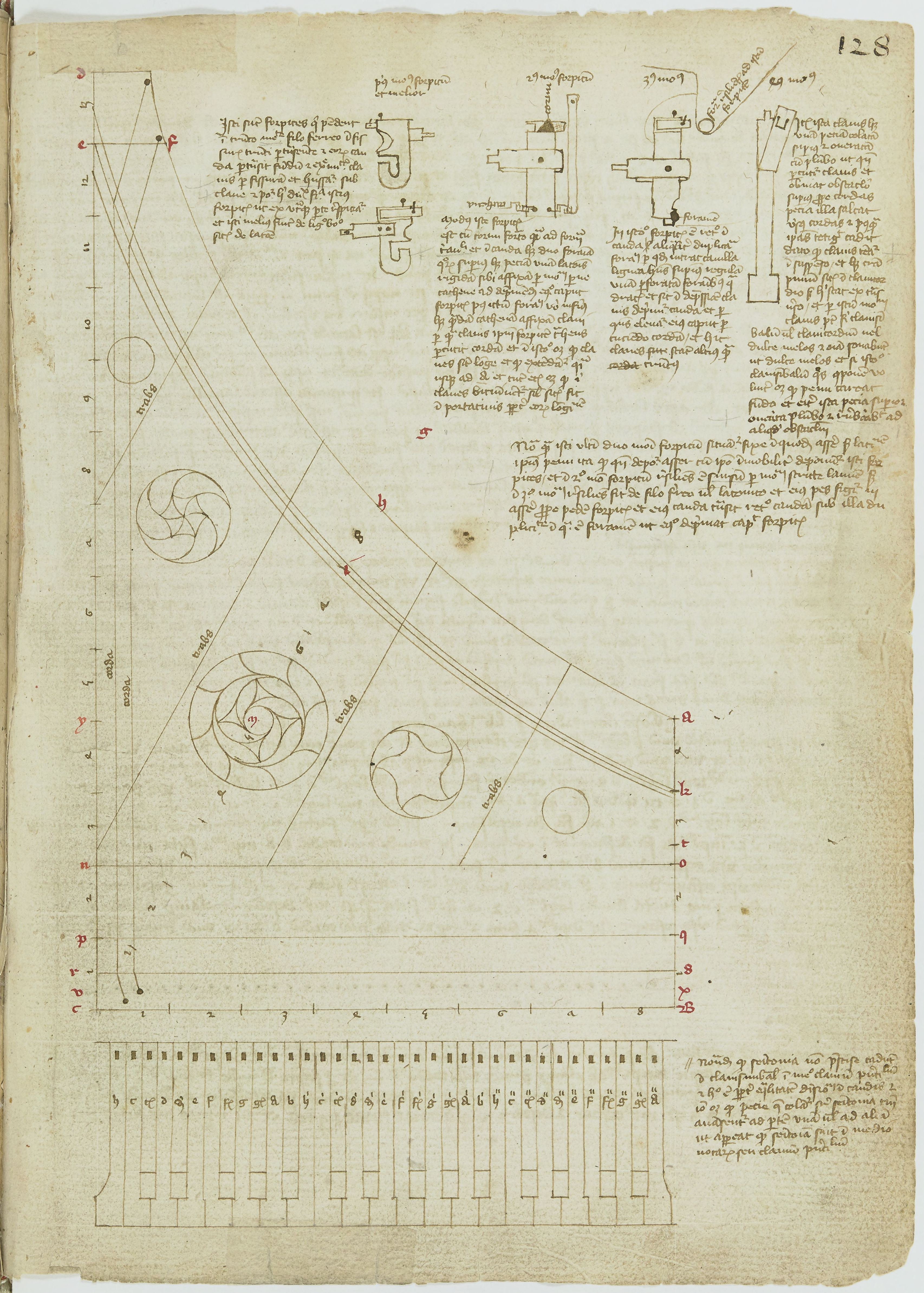 Schéma de clavecin archaïque par Henri Arnault de Zwolle